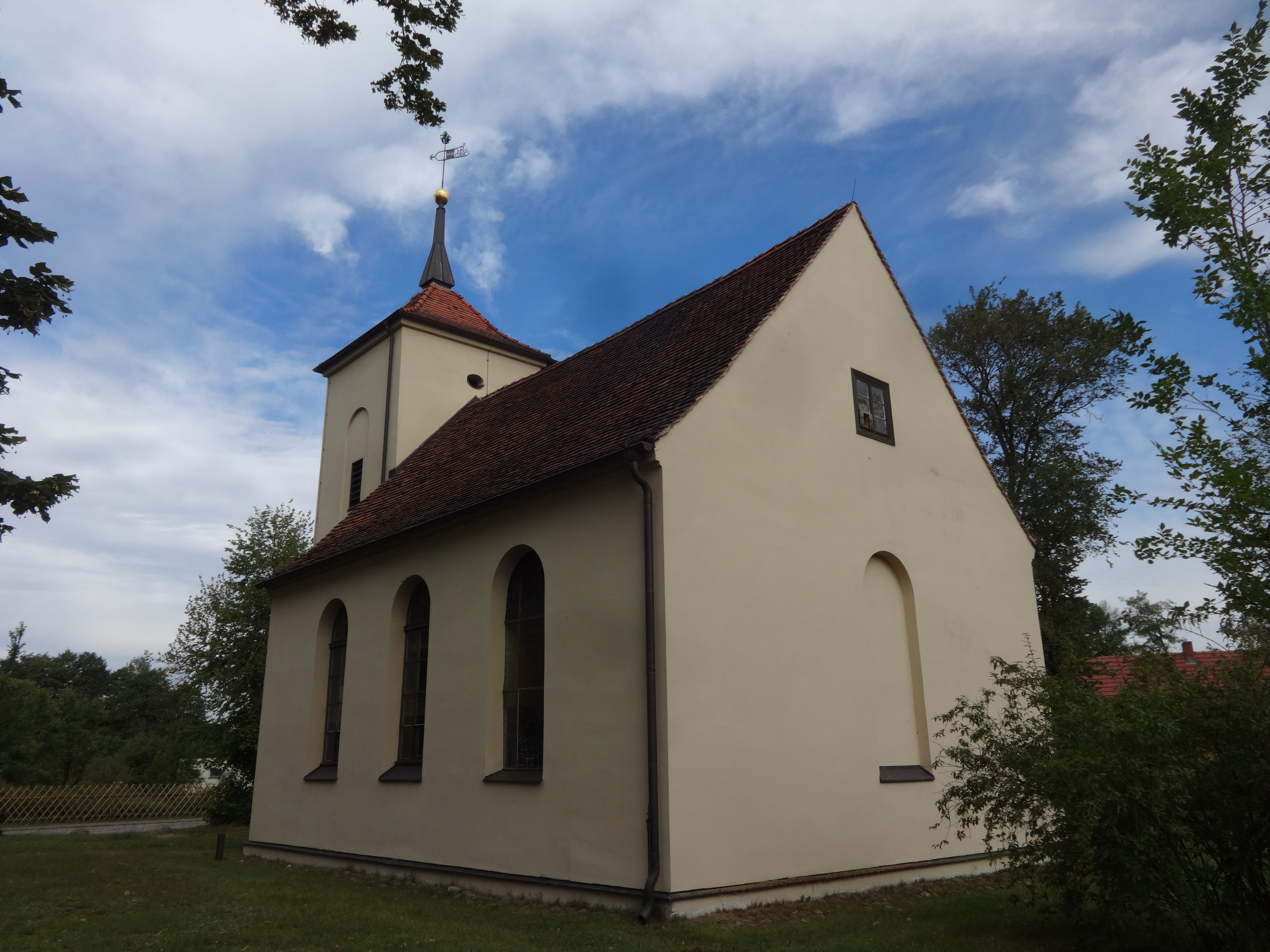 Die Dorfkirche in Seddin, Gemeinde Seddiner See im Landkreis Potsdam-Mittelmark, ist eine Saalkirche aus dem Jahr 1735. Im Innern stehen unter anderem ein polygonaler Kanzelaltar sowie eine Hufeisenempore.